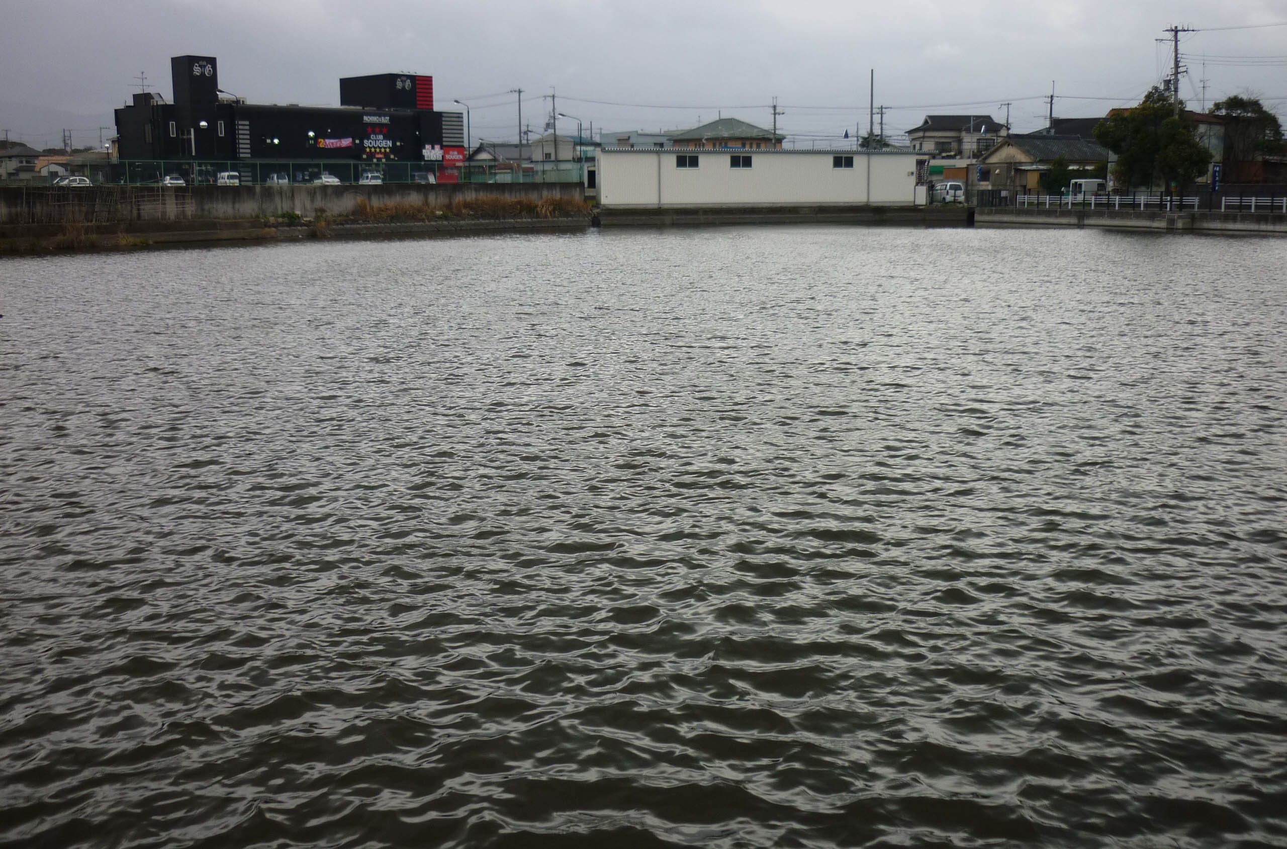 寺池